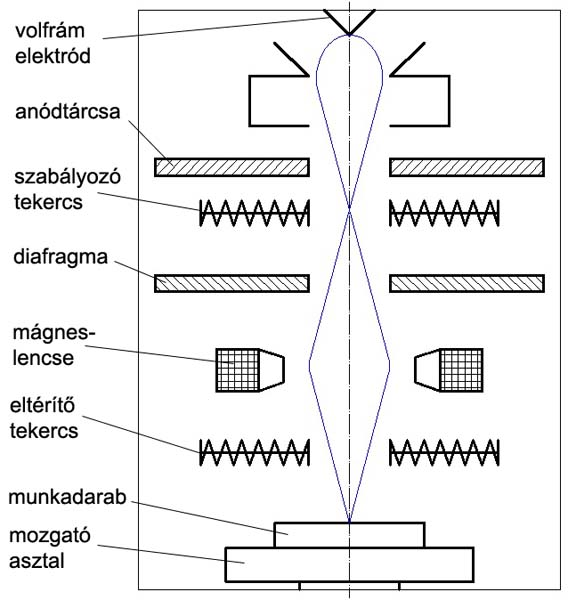 Az elektronsugaras hegesztés elve